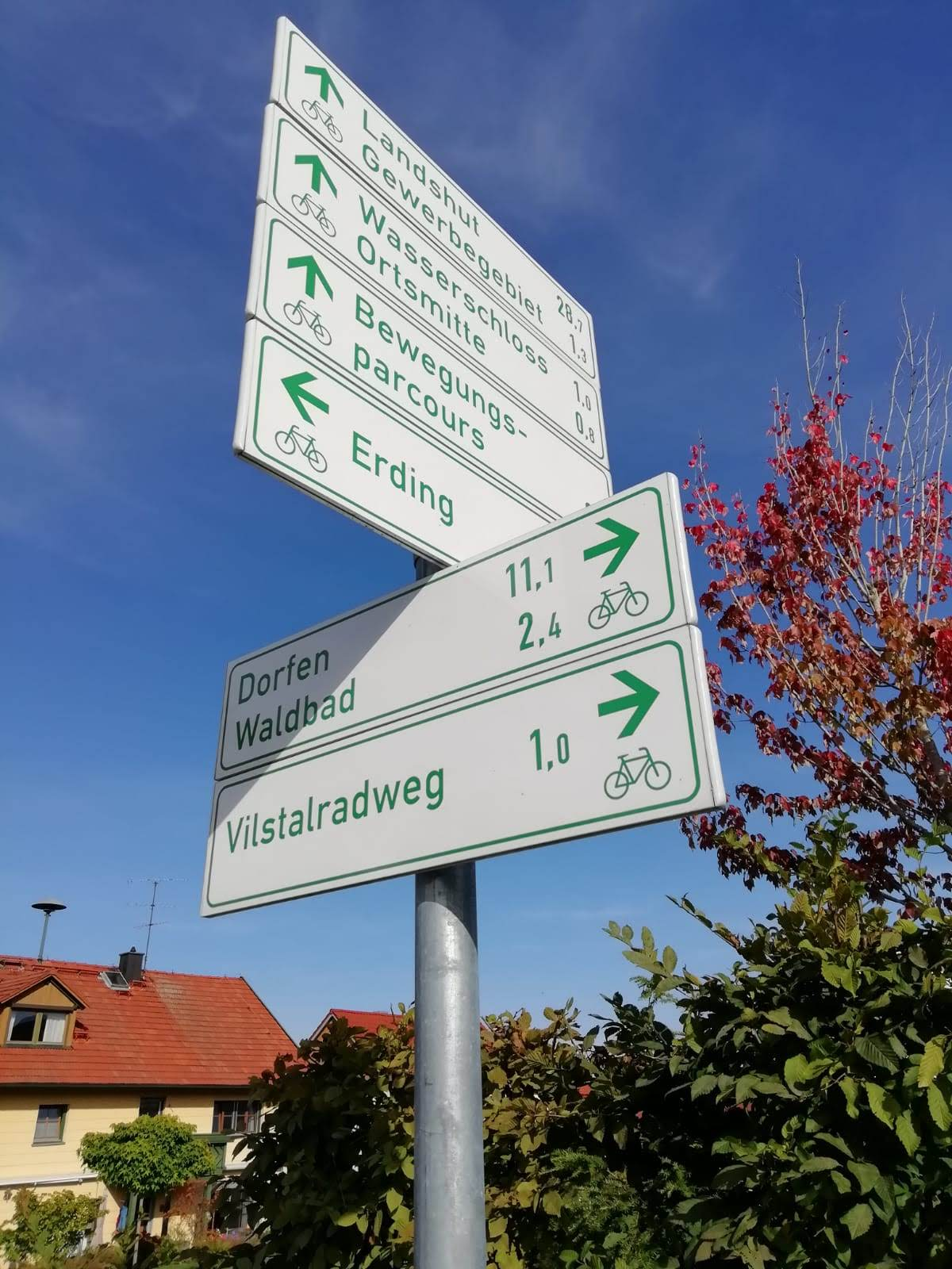 Beschildung der Radwege innerhalb Taufkirchens